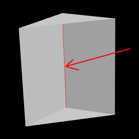 Šķautnes vizualizācija telpā